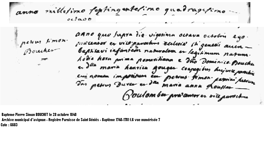 Acte de Bapteme de Pierre Simon Bouchet le 28 octobre 1748